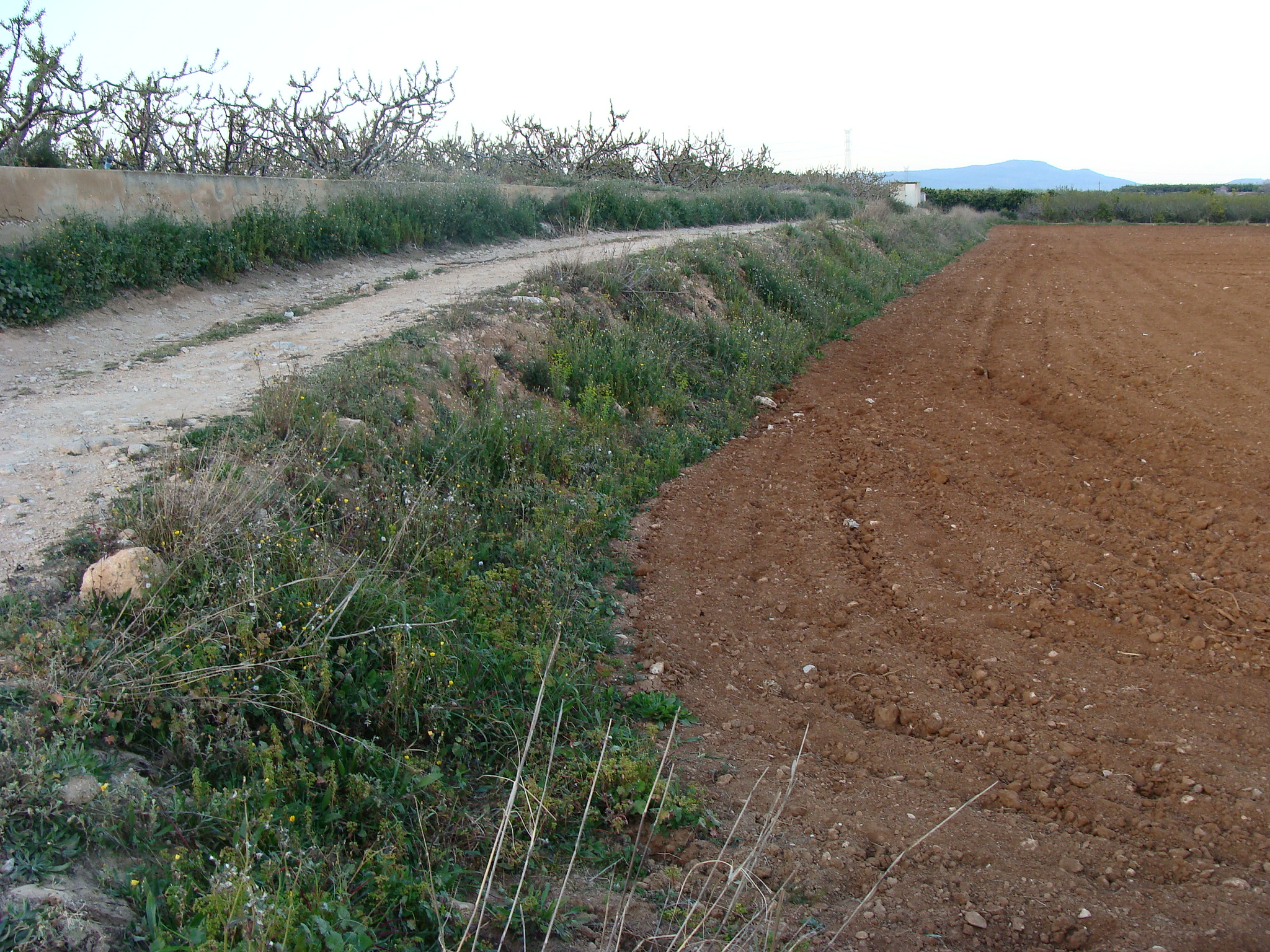 Campo de cultivo de terra rossa (tierra roja, formada por arcilla de descalcificación de las margas).